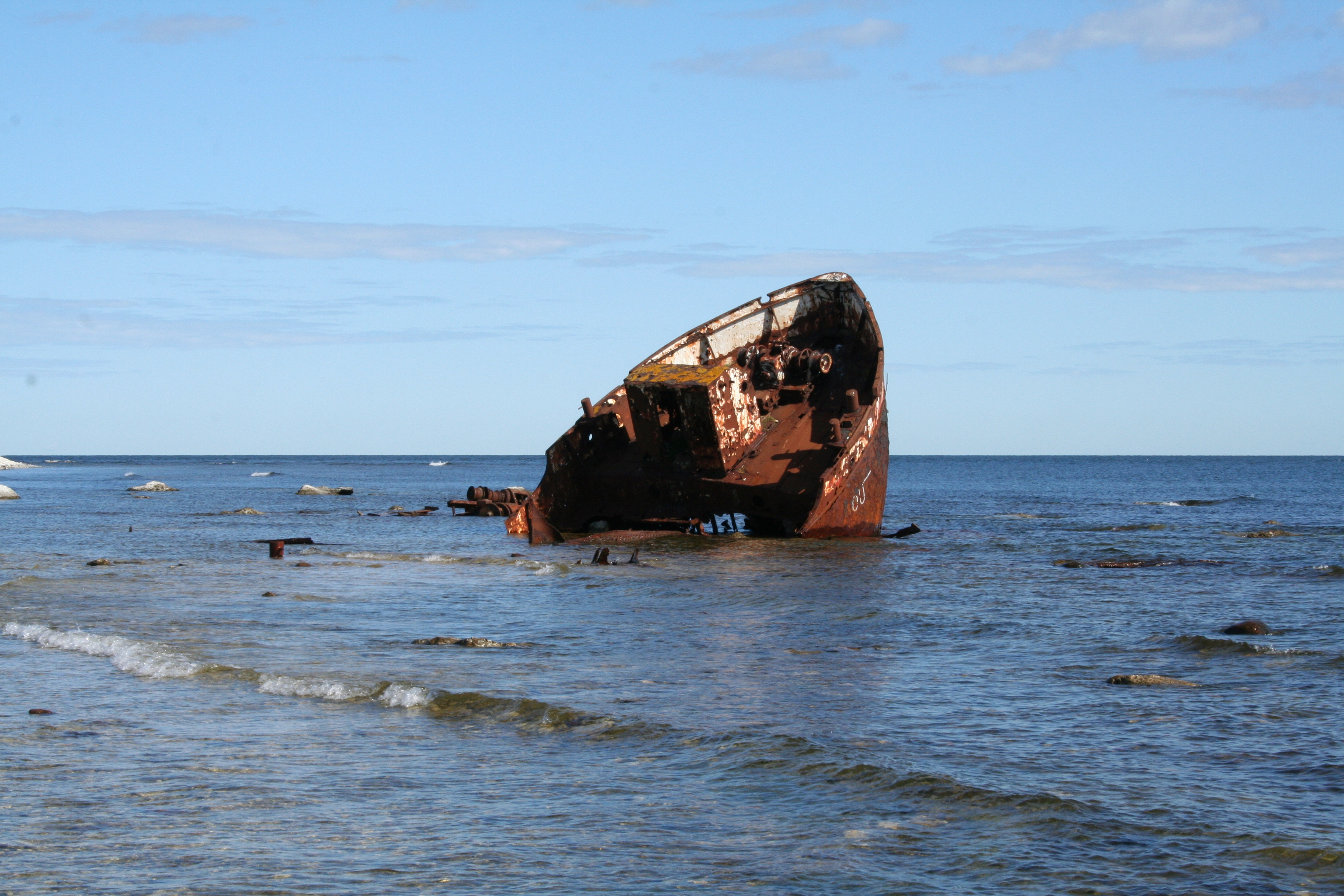 Fortuna, vrak vid Norsholmen, Fårö, Gotland